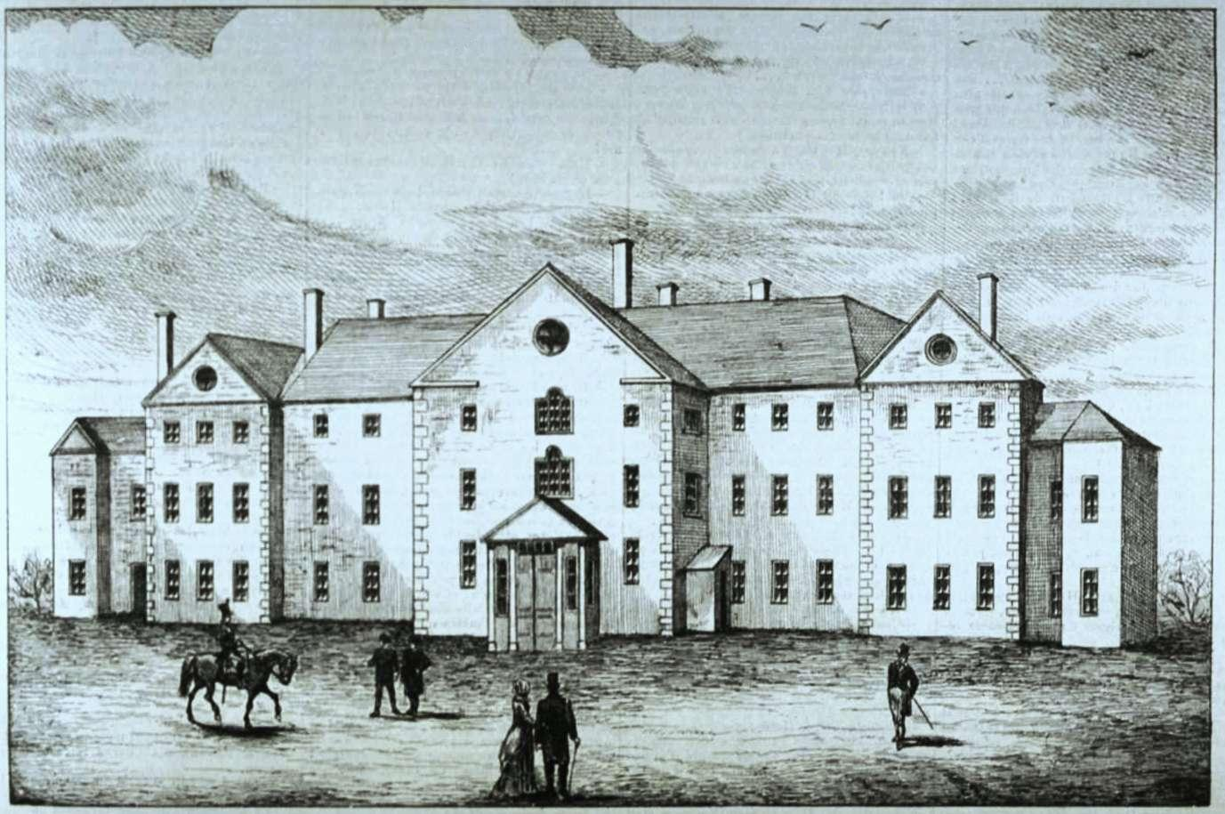 Gravure : Château Saint-Louis à Québec (1620-1834)